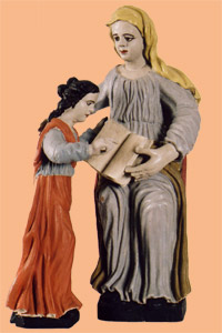 Sainte Anne apprenant à lire à la Vierge - bois polychromé XVIIIeme siècle - dépôt de la fabrique d'église de Rosières